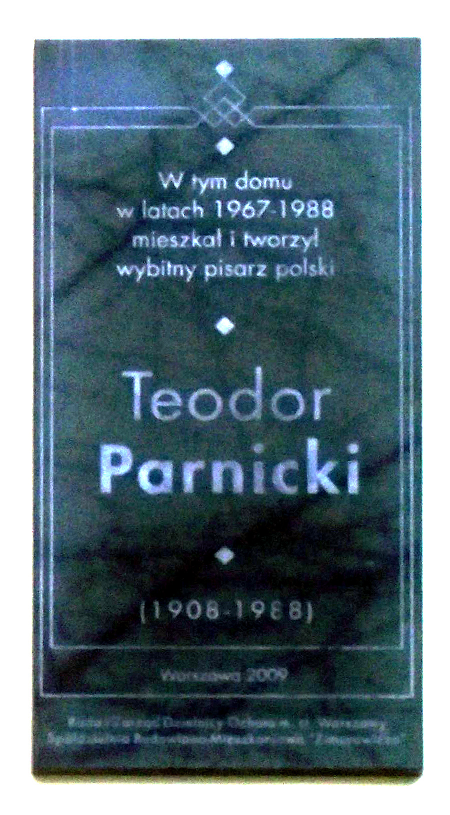 Tablica upamiętniająca Teodora Parnickiego, ul. Zimorowicza 2 w Warszawie